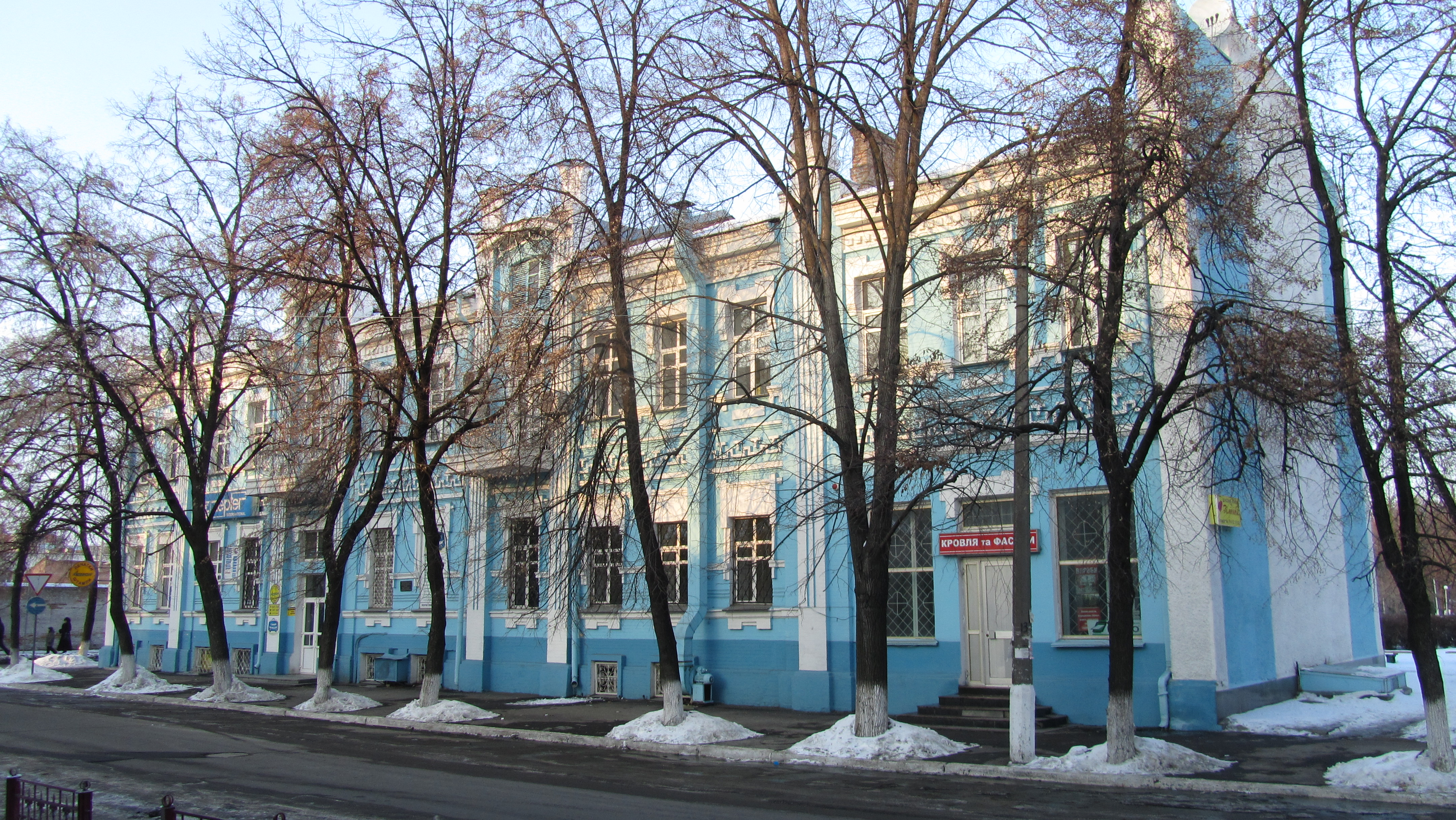 Будинок Силаєва